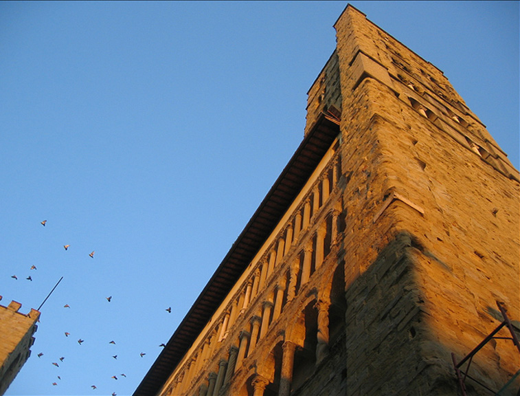 Chiesa di Santa Maria della Pieve ad Arezzo, 2005.